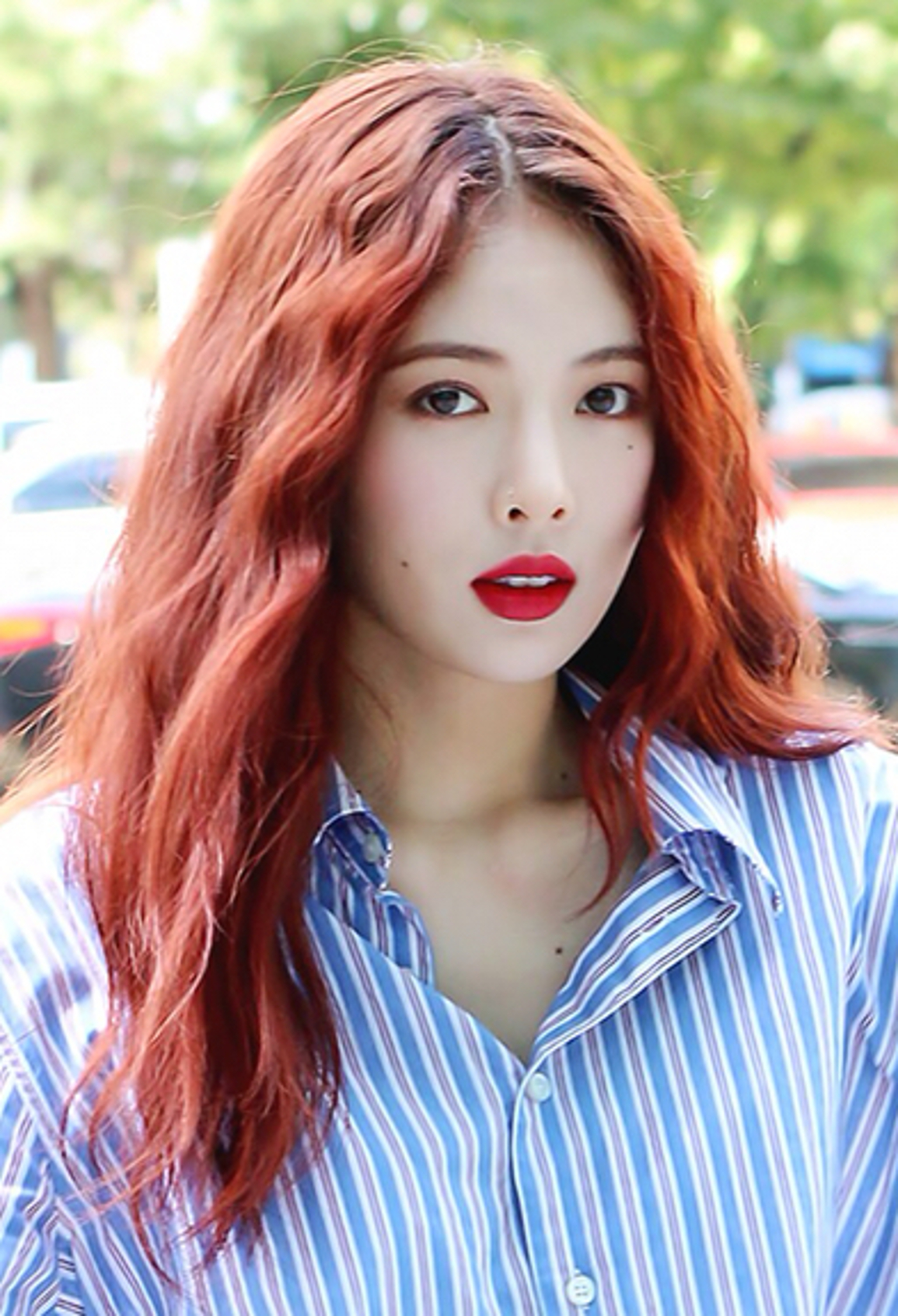 170904 언니네 라디오 출퇴근.